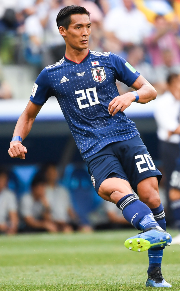 Япония проиграла Польше, но вышла в плей-офф